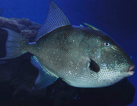 Pez gatillo - Palma Aquarium